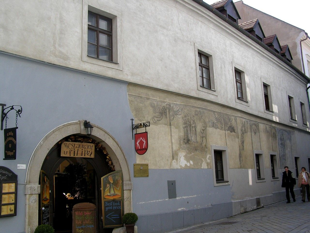 Biela ul. č. 6. Celkový pohľad na dom s figurálnymi maľbami Object location48° 08′ 38.76″ N, 17° 06′ 27.36″ E